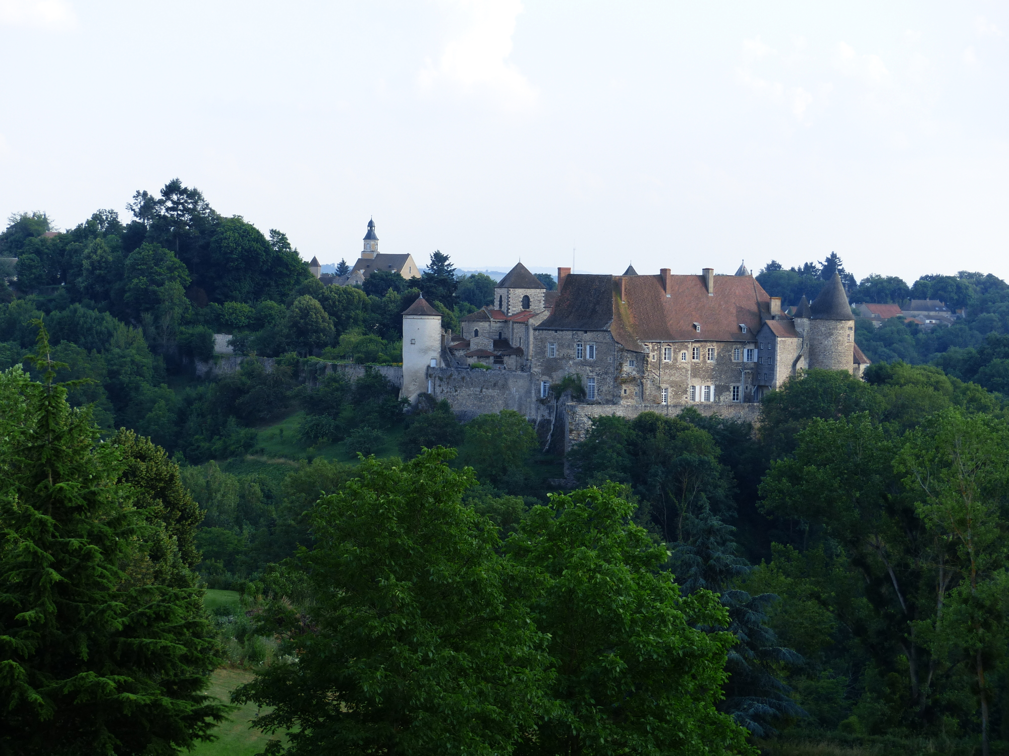 Abbaye bénédictine Saint-Vincent de Chantelle à Chantelle (Allier). Vue depuis Deneuille-lès-Chantelle, par-dessus la Bouble.